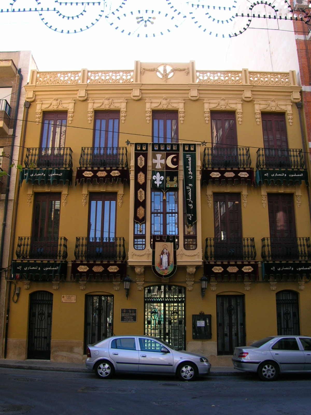 Sede de la Junta Central de Moros y Cristianos de Elda. Una casa modernista situada en la Calle Nueva de la ciudad de Elda (Alicante)